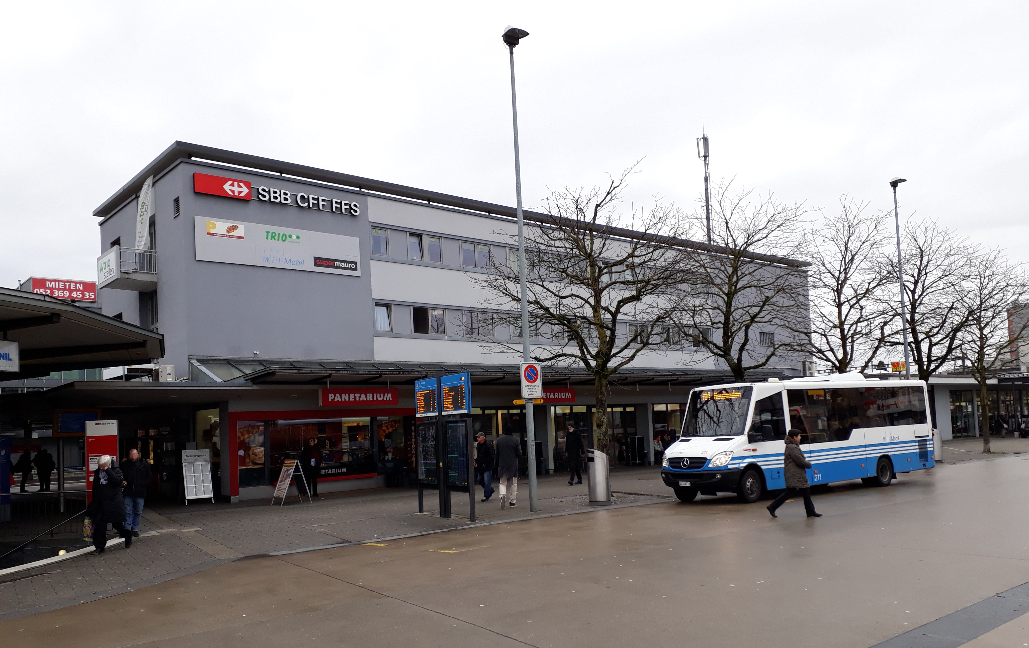 Bahnhof Wil SG mit Kleinbus der WilMobil